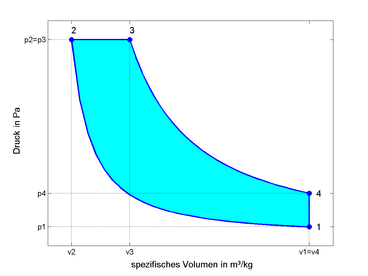 Pv-Diagramm idealer Dieselprozess